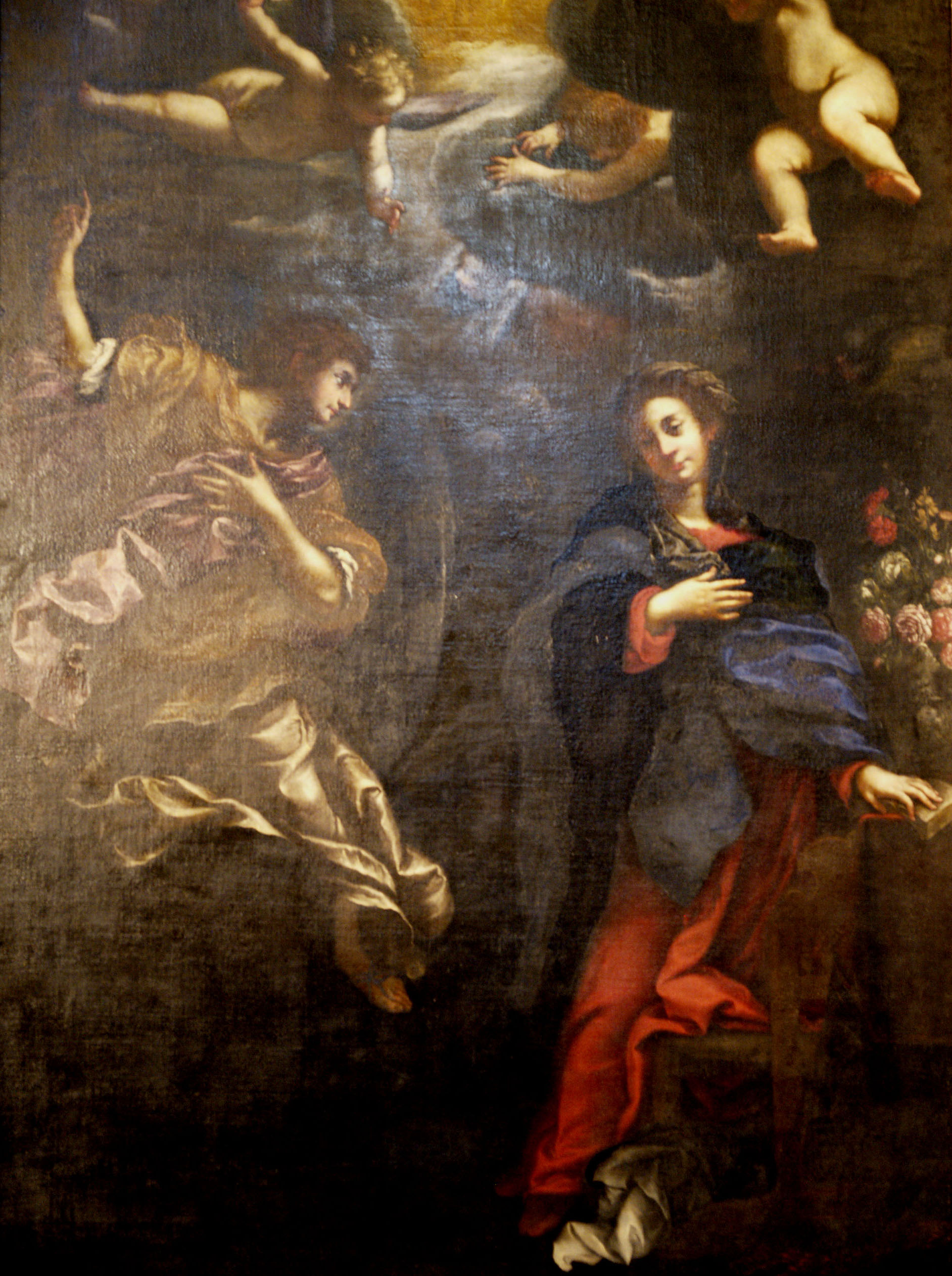 Anunciación, óleo sobre lienzo, Florencia, iglesia de San Francisco de Paula